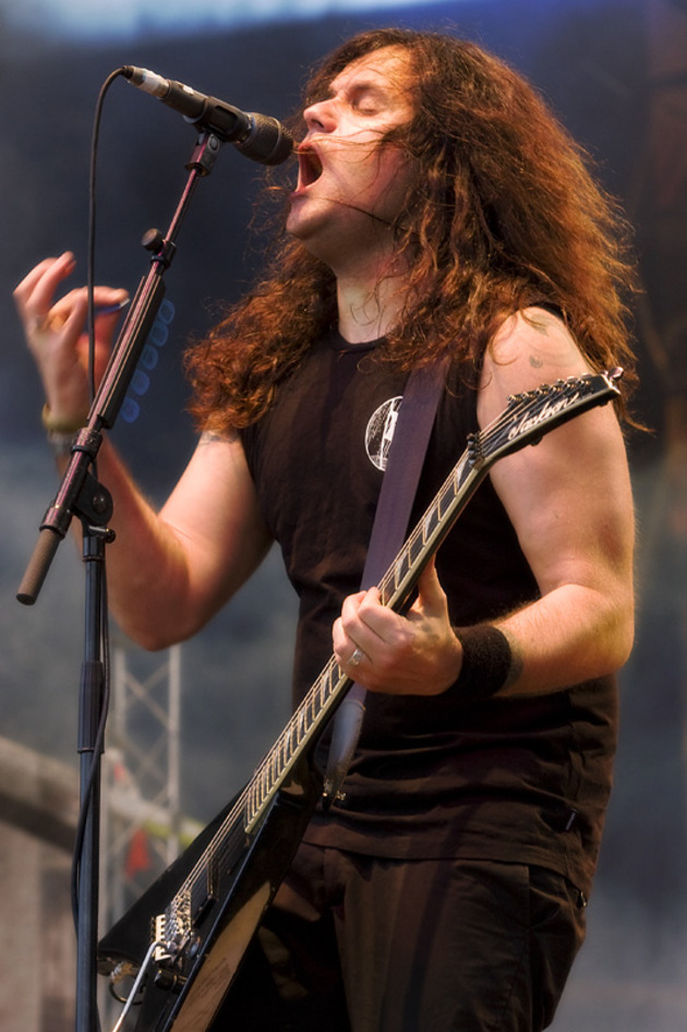 Mille Petrozza